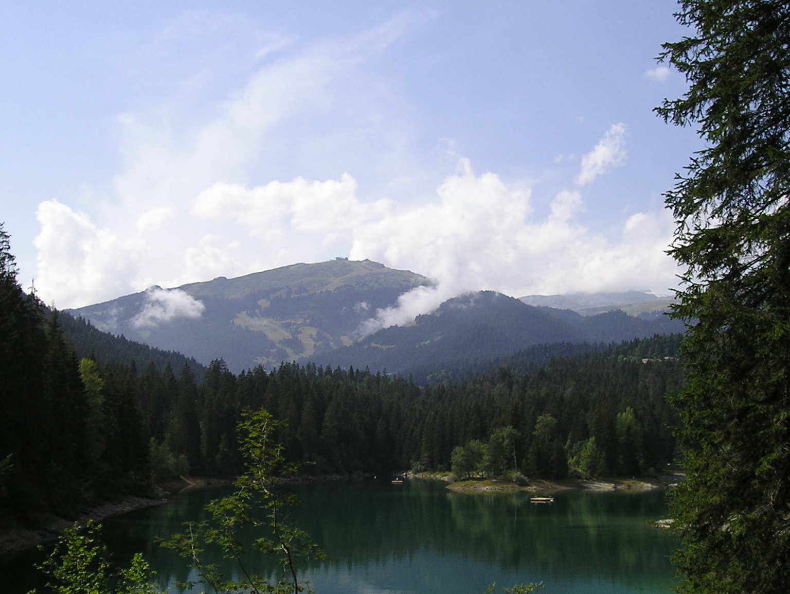 Foto del Lago Cauma, Flims (GR), Svizzera, autore Massimo Macconi agosto 2003